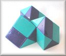 RubiksSnake_ThreePeaks.jpg